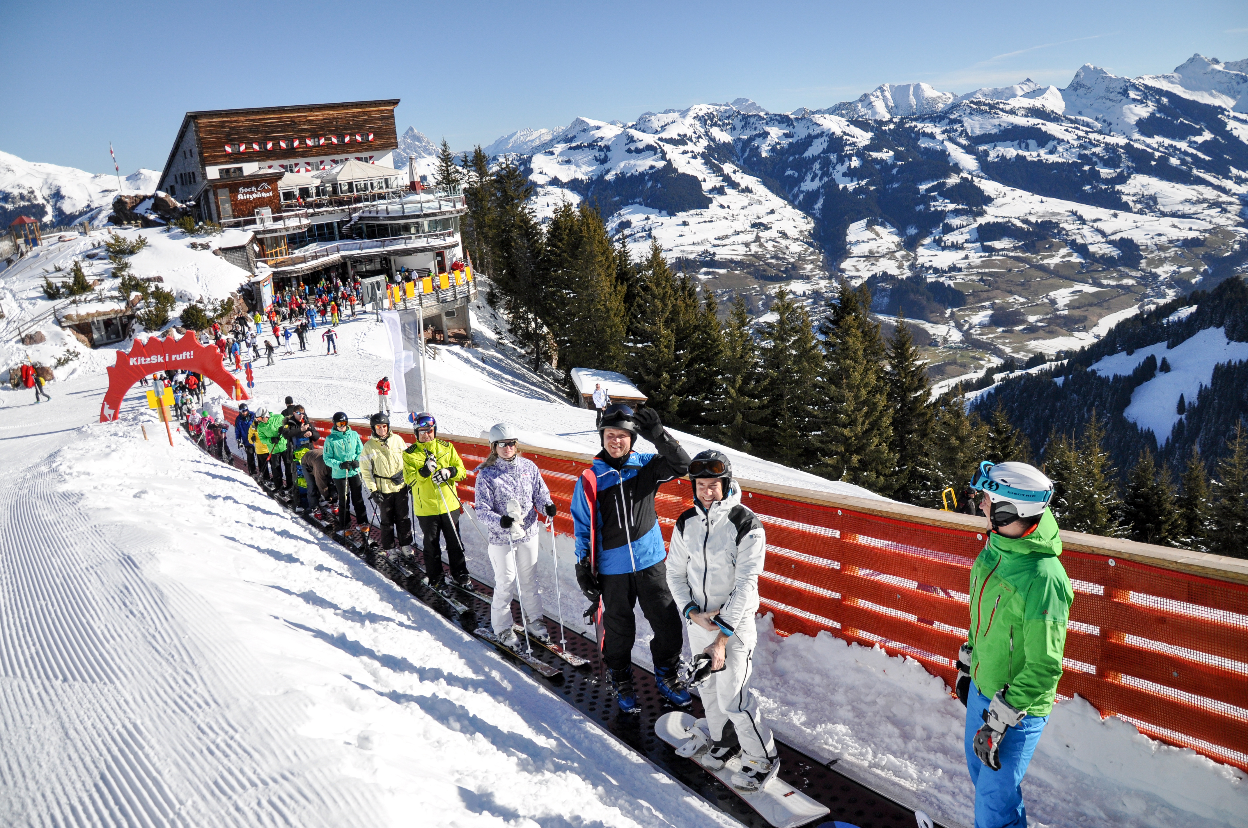 Sunkid Förderband "Zauberteppich" für Wintersport in Kitzbühel